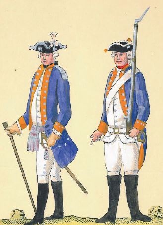 68. 2 Regiment Pieszy Buławy Wielkiej Litewskiej